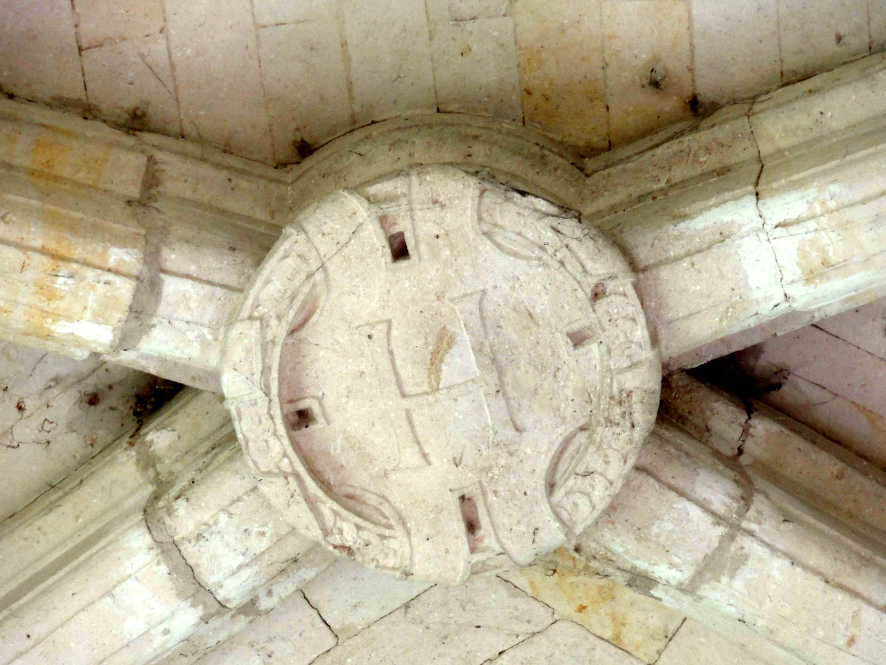 Clé de voûte (voir titre).